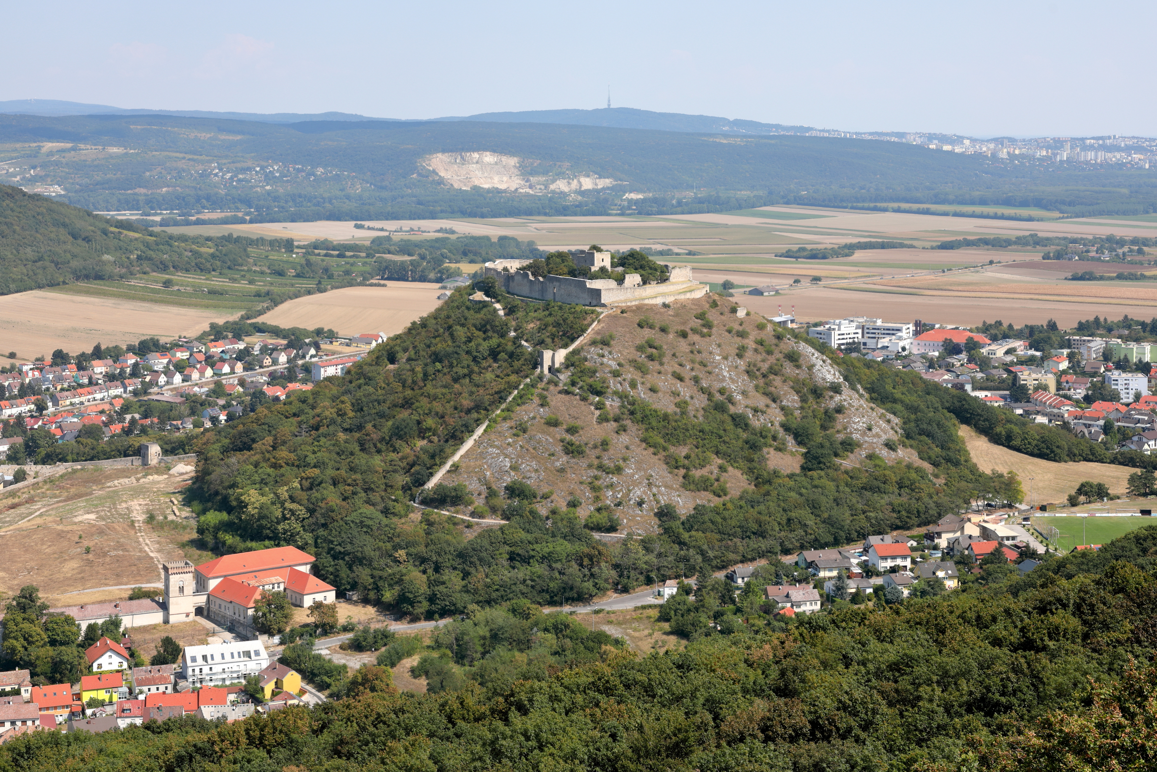 Die Burgruine Heimenburg, auch als „Burgruine Hainburg“ bezeichnet, auf dem 291 m hohen Schlossberg in der niederösterreichische Stadtgemeinde Hainburg an der Donau.Die ehemalige Burg auf dem weithin sichtbaren Schlossberg wurde ab Mitte des 11. Jahrhunderts errichtet. Sie wurde bei der 2. Türkenbelagerung 1683 zerstört. Nach 1742 trat, bedingt durch die Errichtung eines neuen Schlosses am Fuß des Schlossberges (1966 großteils abgetragen), der Verfall der Burg ein.